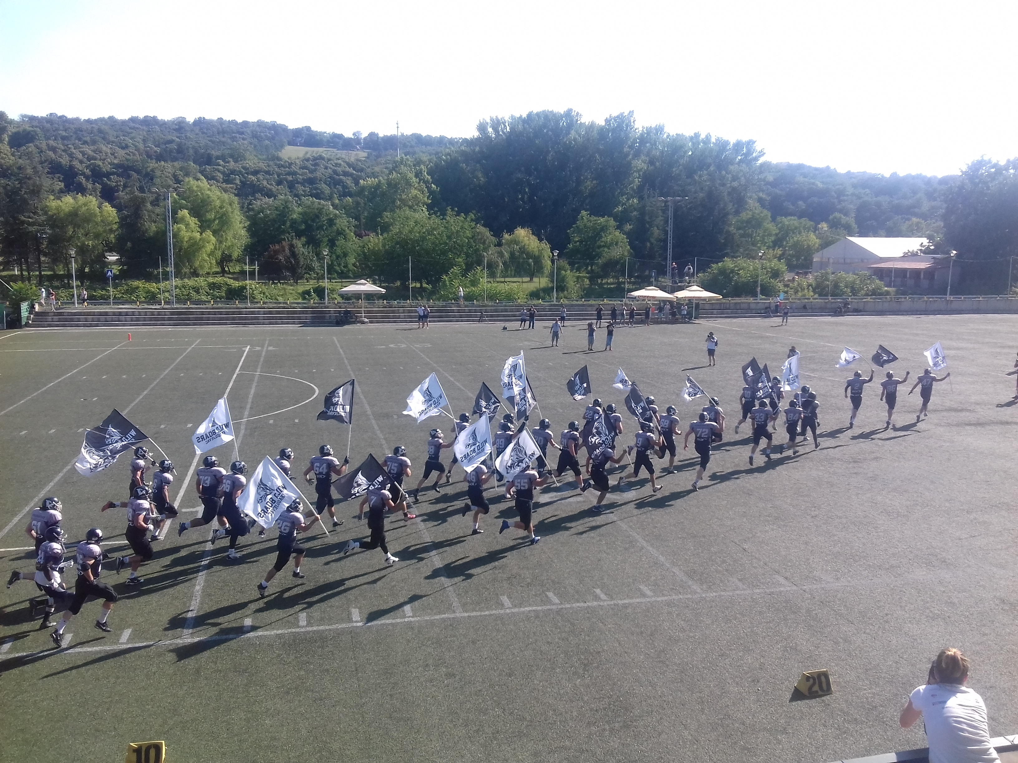 Српски (ћирилица): Сербијан боул 12 (Вукови-Дивљи вепрови)